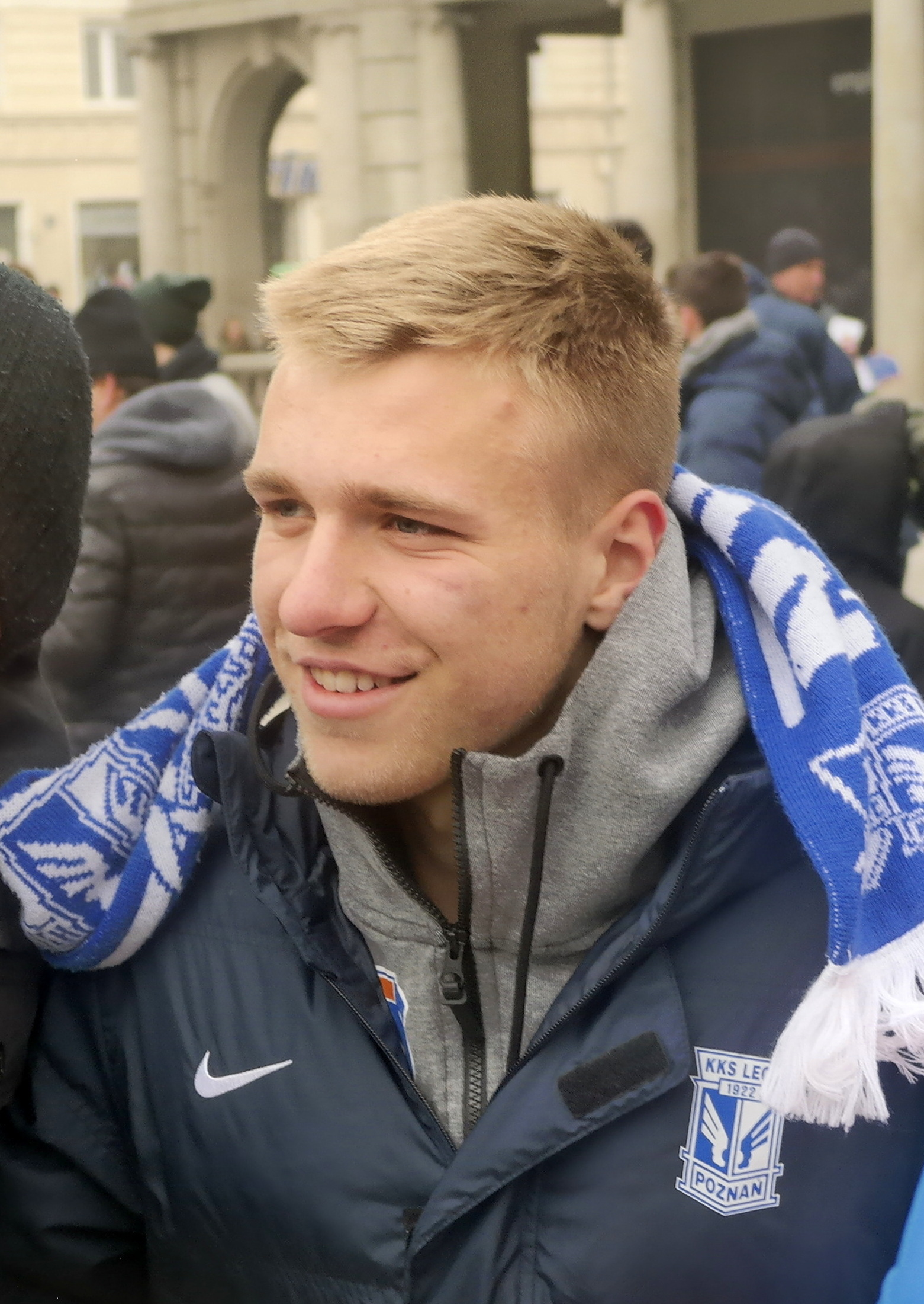 Tymoteusz Puchacz, piłkarz Lecha Poznań podczas akcji "Pierwszy Gwizdek" na Placu Wolności w Poznaniu